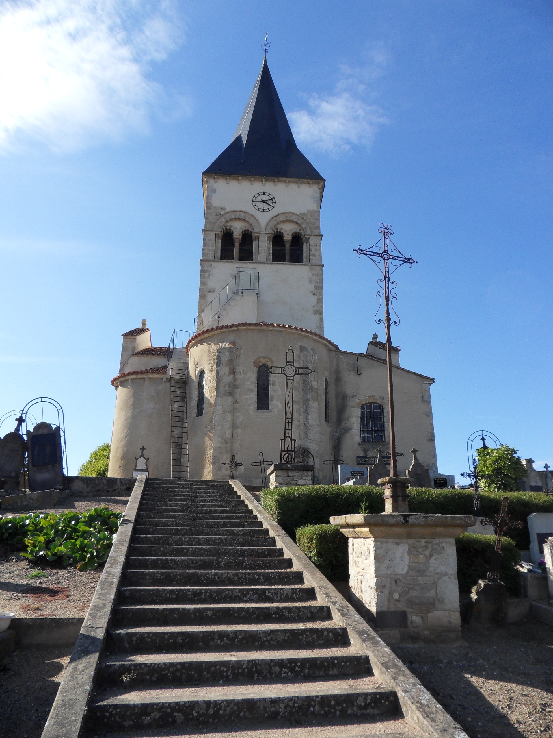 Église Saint-Martial, (Inscrit, 1927)